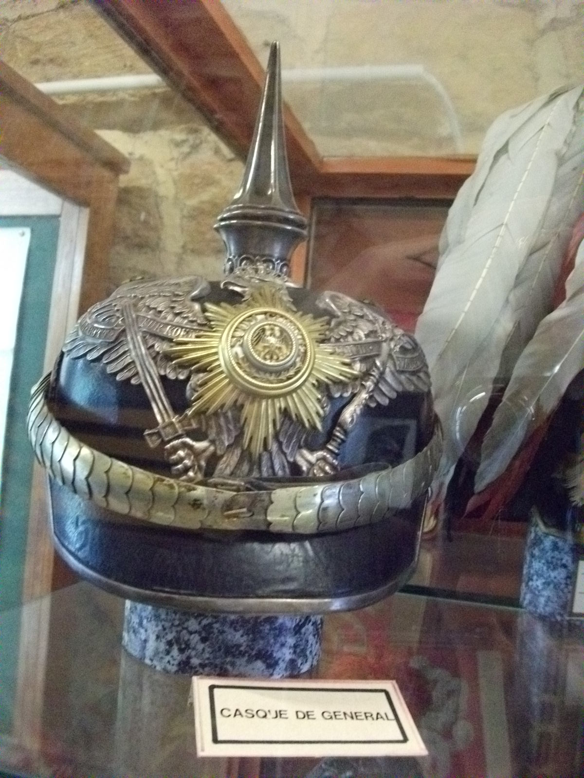 Casque de général prussien de la Première guerre mondiale, présenté au musée du fort de la Pompelle.